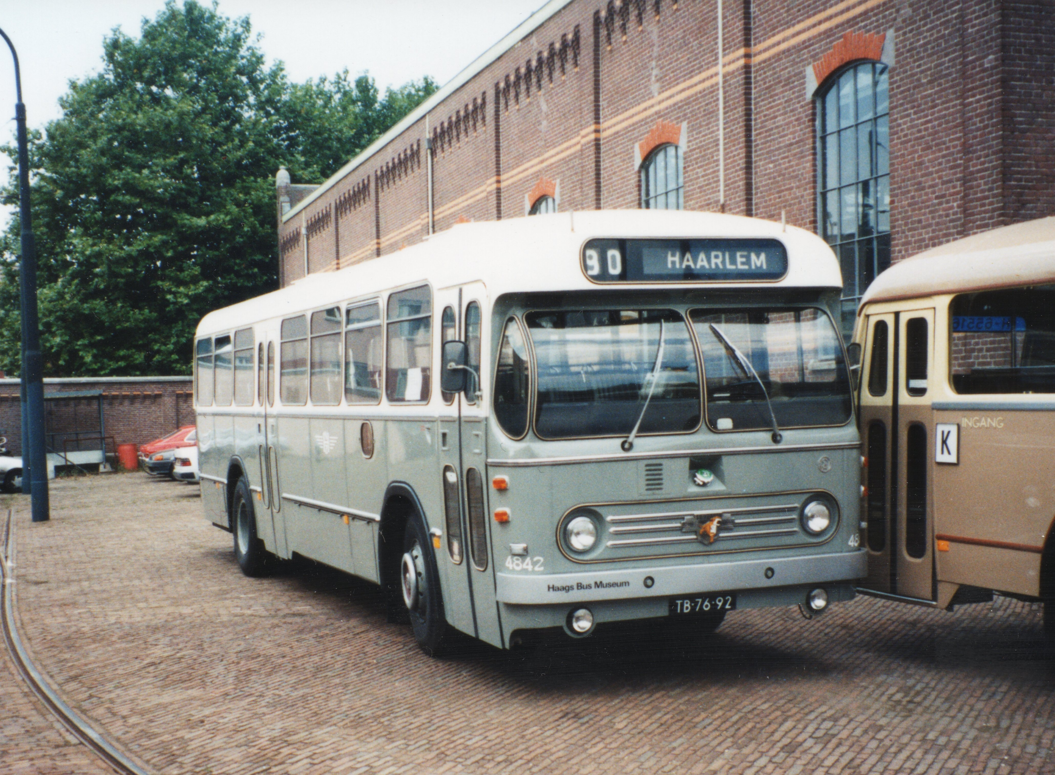 NZHVM-bus 4842, Leyland-Werkspoor LE-WS, bouwjaar 1960, in het Haags Openbaar Vervoer Museum, 1998